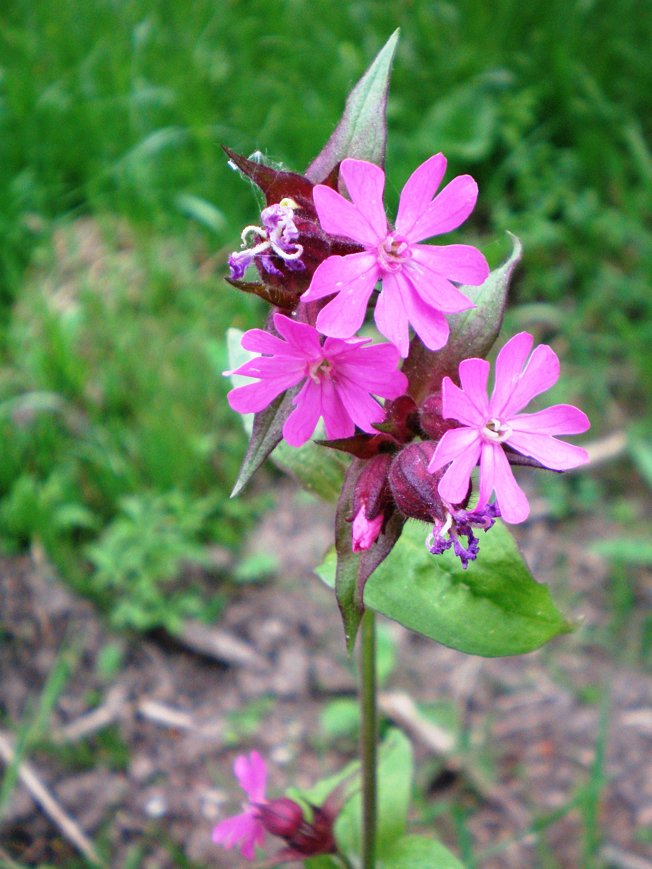 Raudonžiedis šakinys